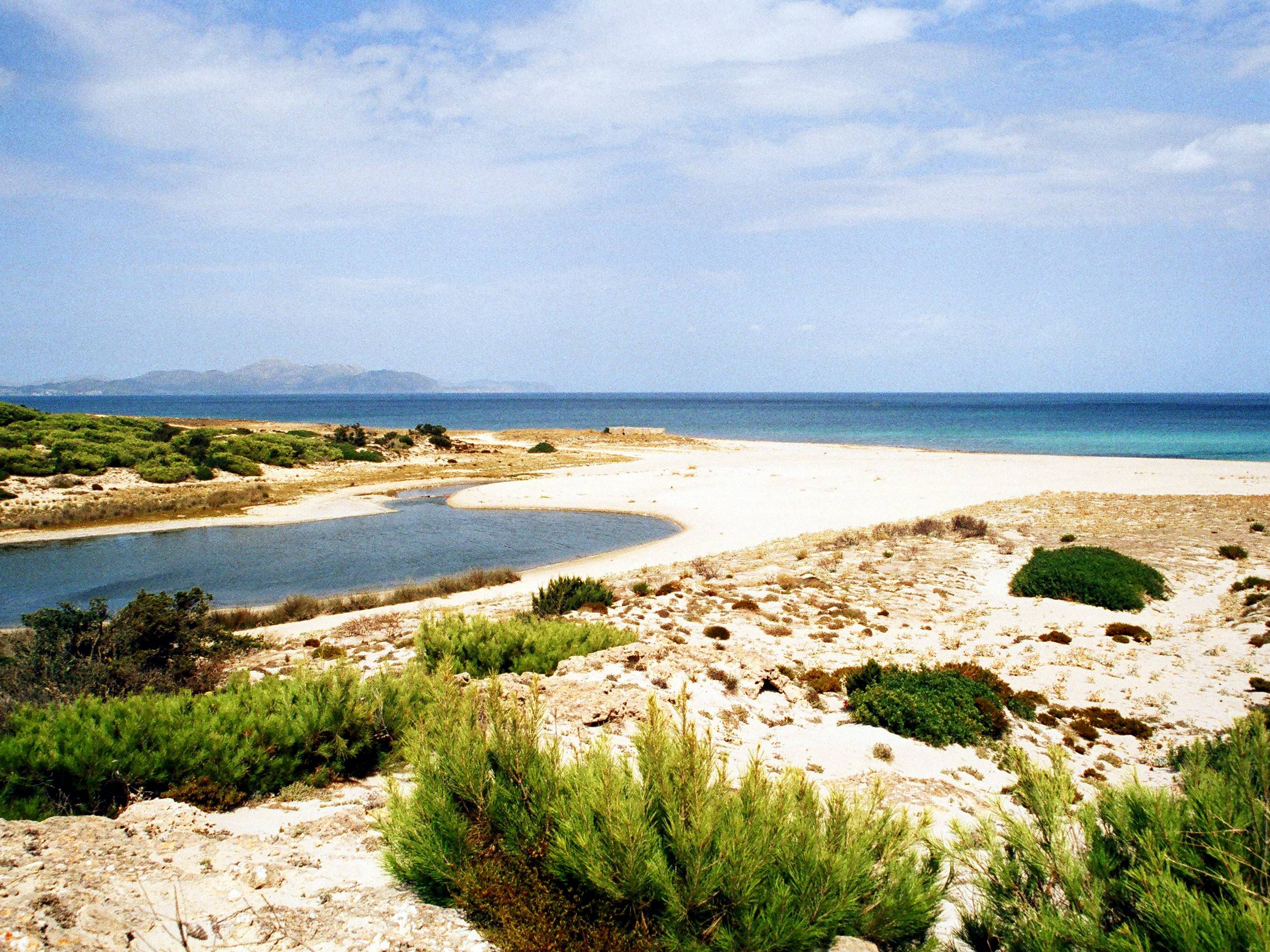 Platja de son Real, Strand an der Bucht von Alcudia, Mallorca (Balearen)